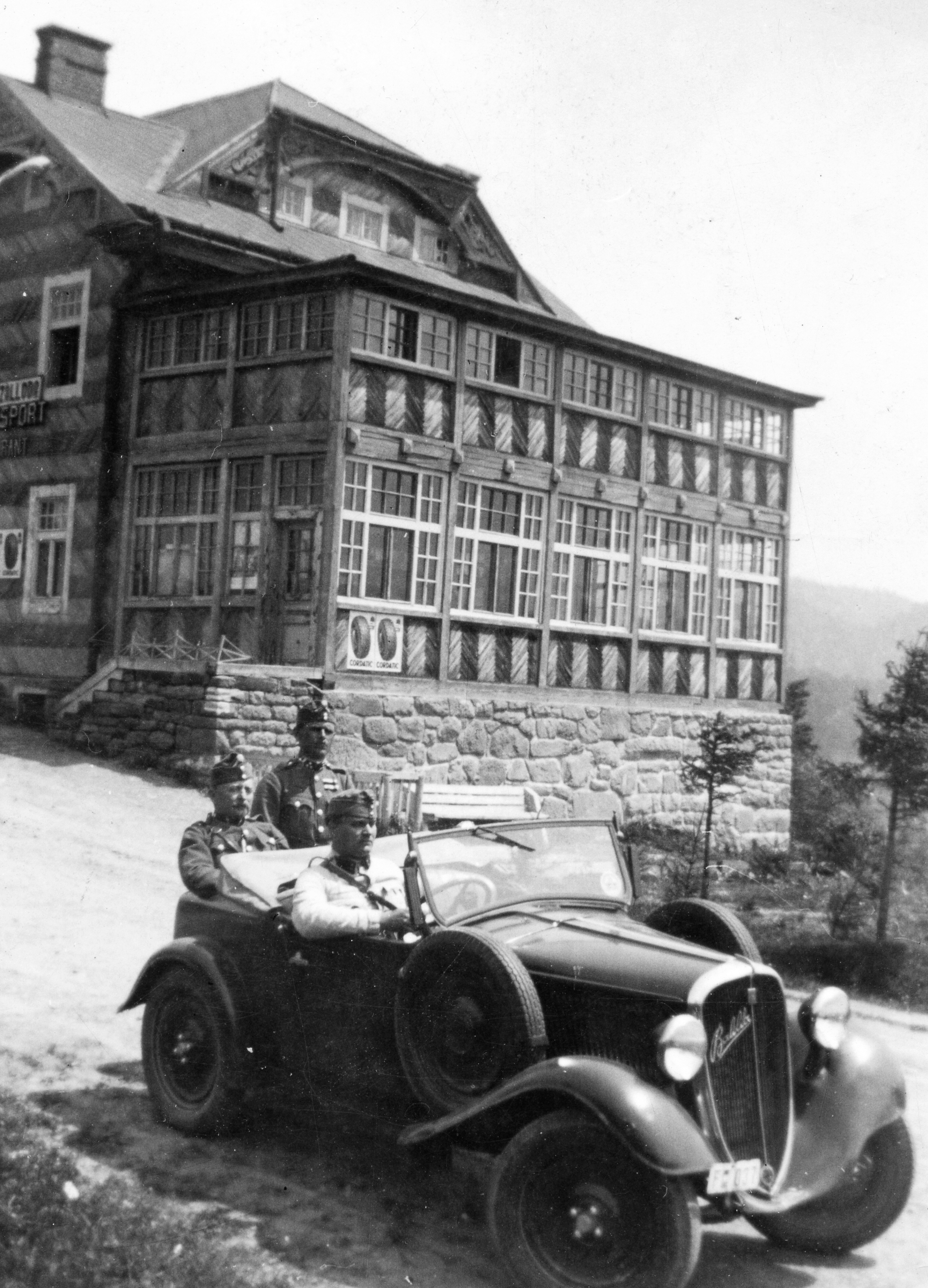 Sportszálló, honvédségi Fiat 508 Balilla személygépkocsi. Location: Ukraine, Uzhok Tags: Fiat-brand, Italian brand, automobile, soldier, Transcarpathia Title: Sportszálló, honvédségi Fiat 508 Balilla személygépkocsi.